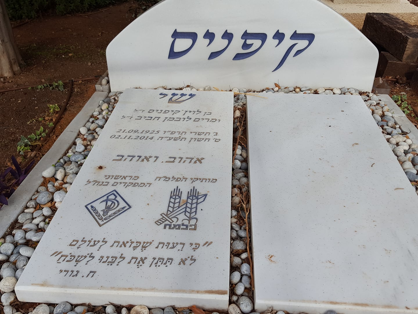 קברו של שי קיפניס בקיבוץ עין חרוד